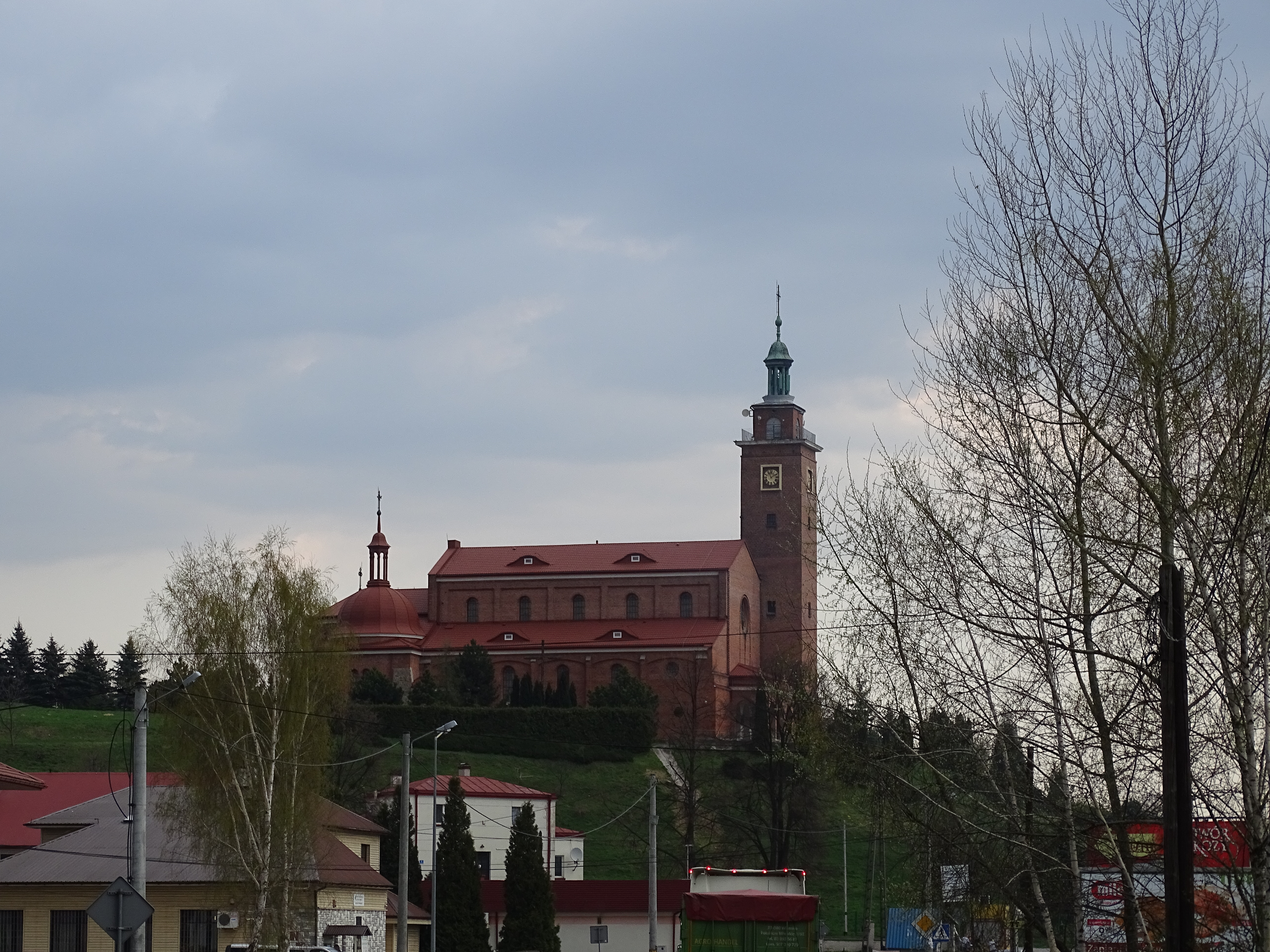 Dwikozy, Sandomierz County, Poland. Parish church. XX century.